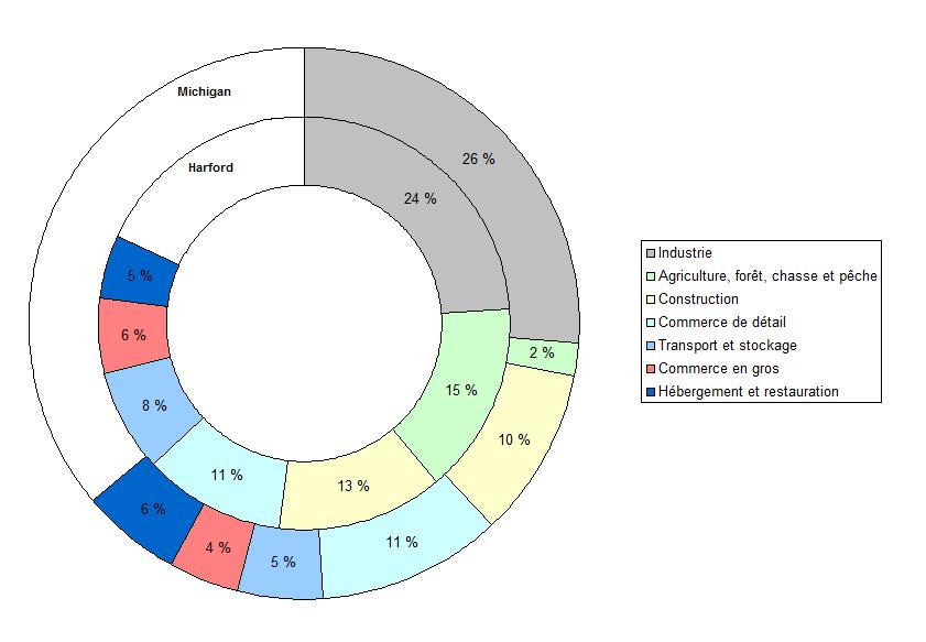 Secteurs d'activité de la population active, à Hartford (Michigan) et dans l'ensemble du Michigan (Etats-Unis).